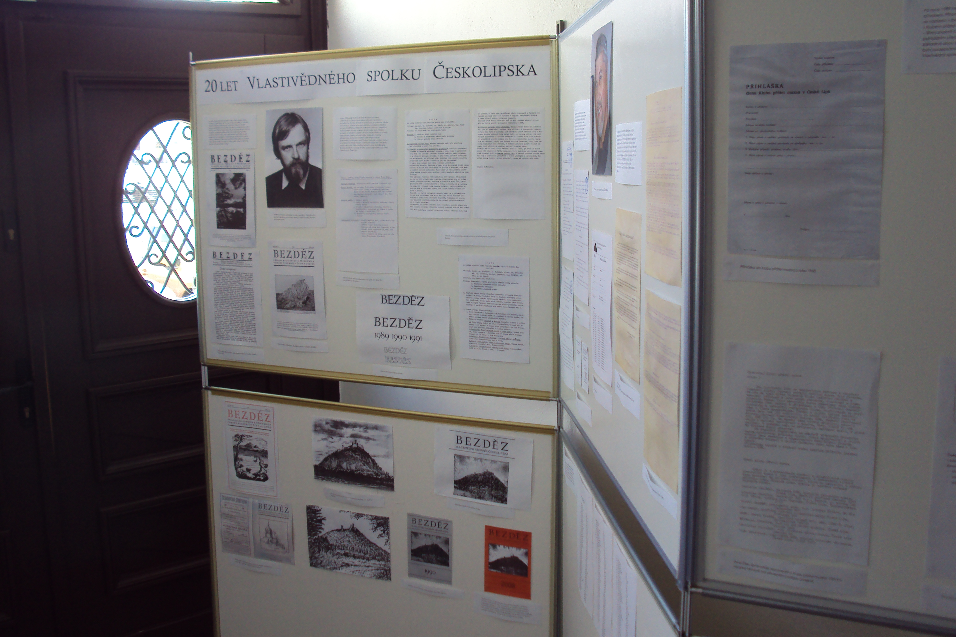 Výstavka 20 let Vlastivědného spolku na chodbě Městské knihovny v České Lípě